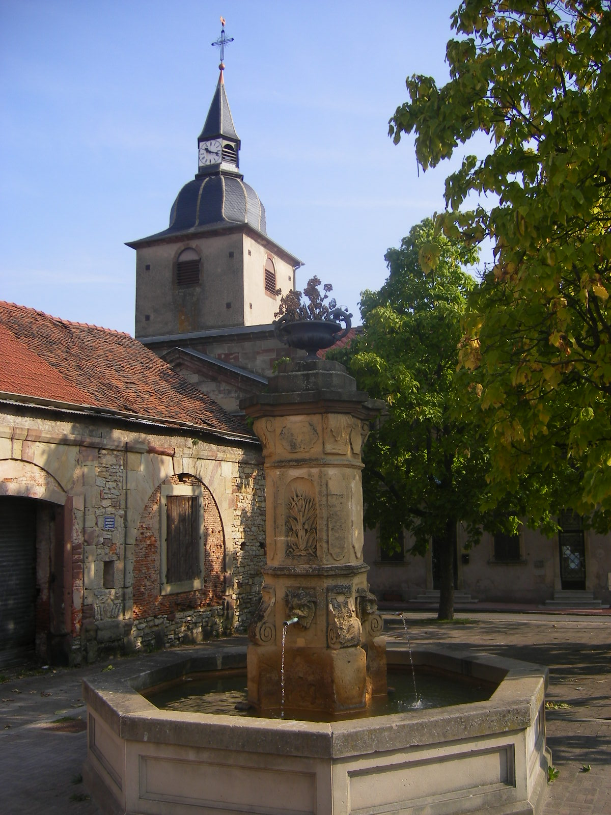 Fontaine, à Sarreguemines, quartier de Welferding (Moselle)